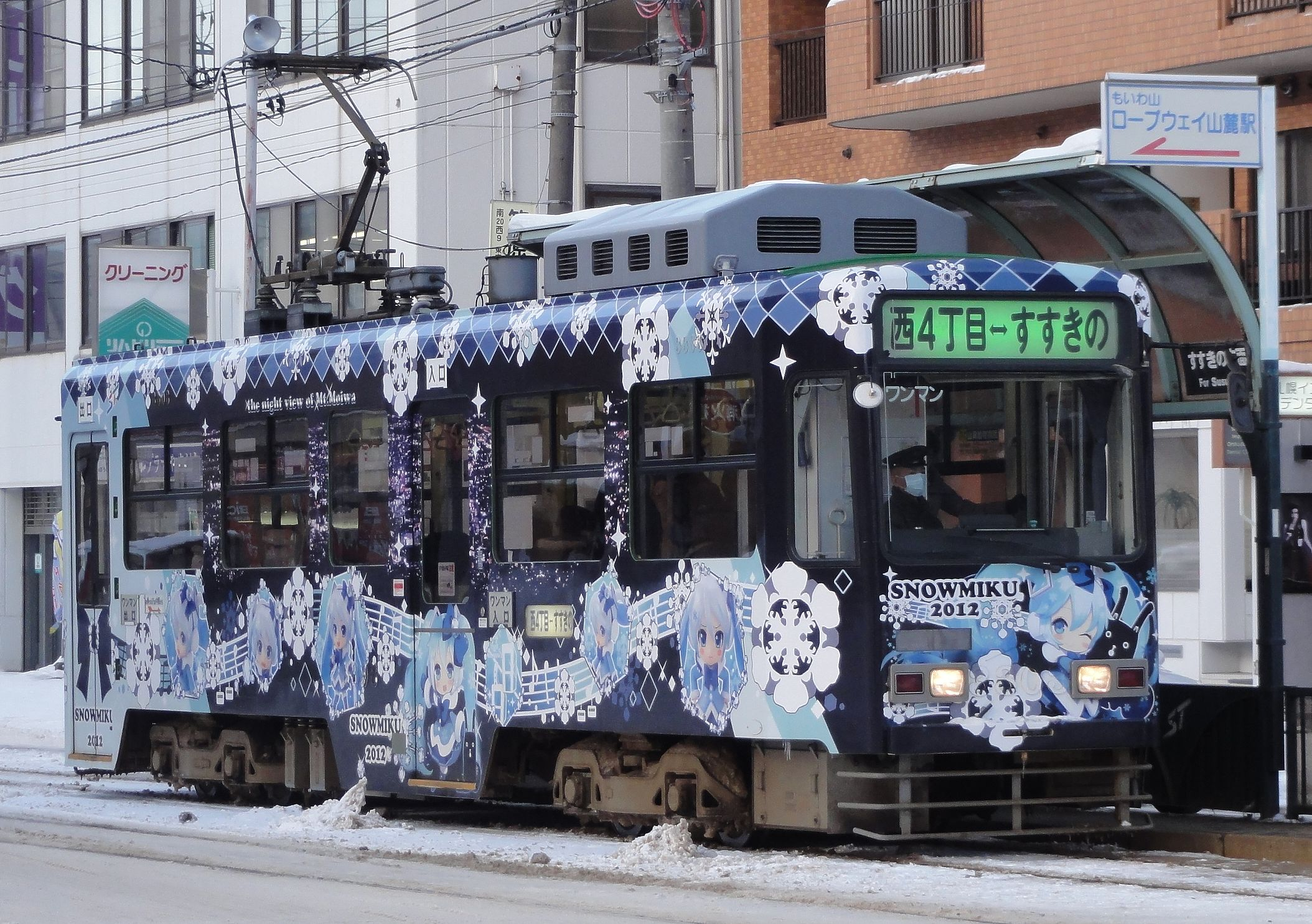 札幌市交通局3300形電車 「雪ミク」ラッピング